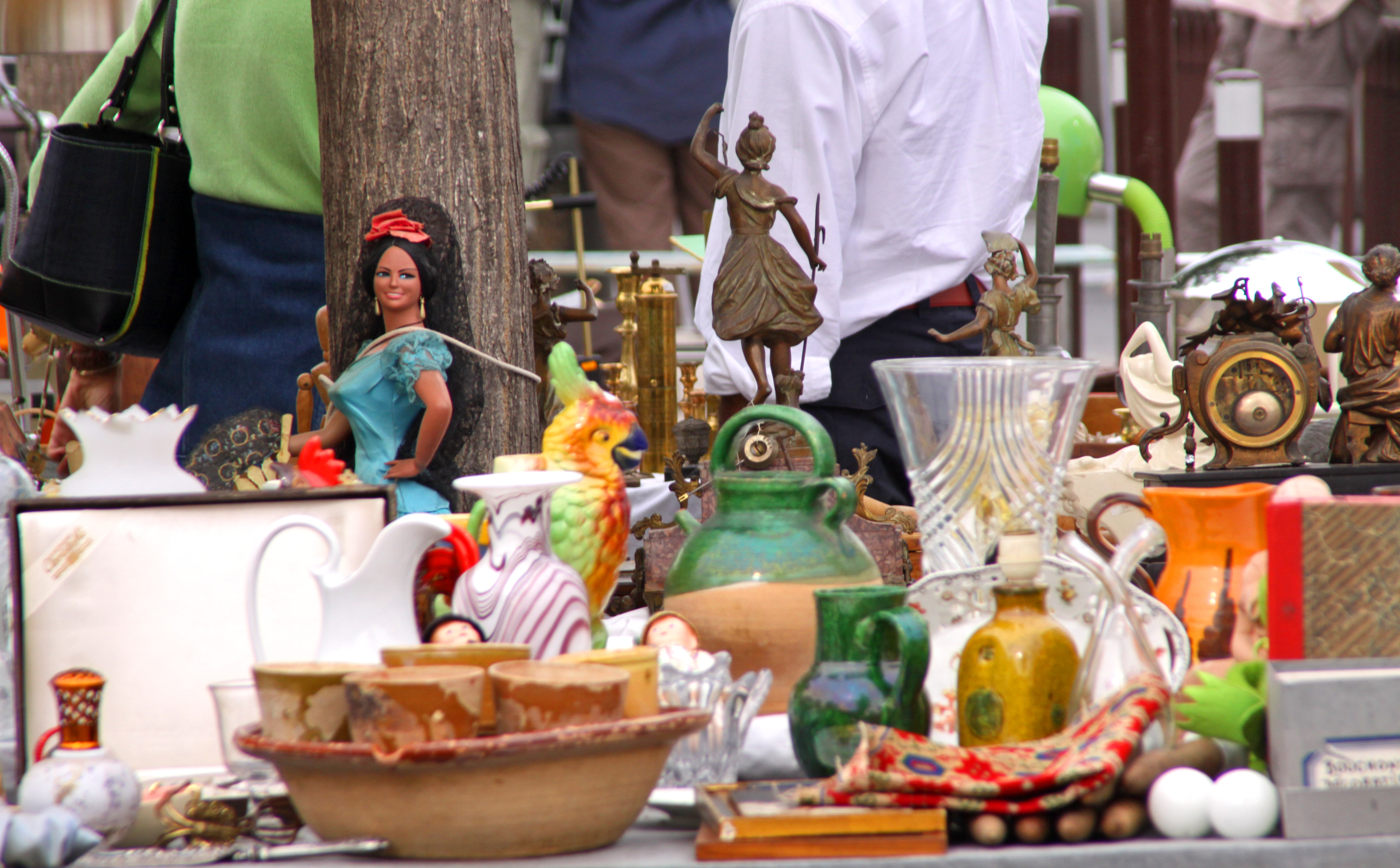 Étal à l'Isle-sur-la-Sorgue